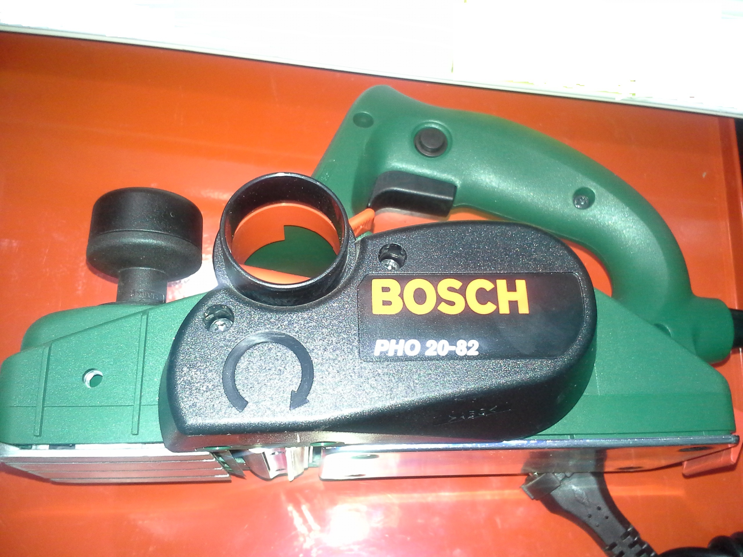 Електрорубанок